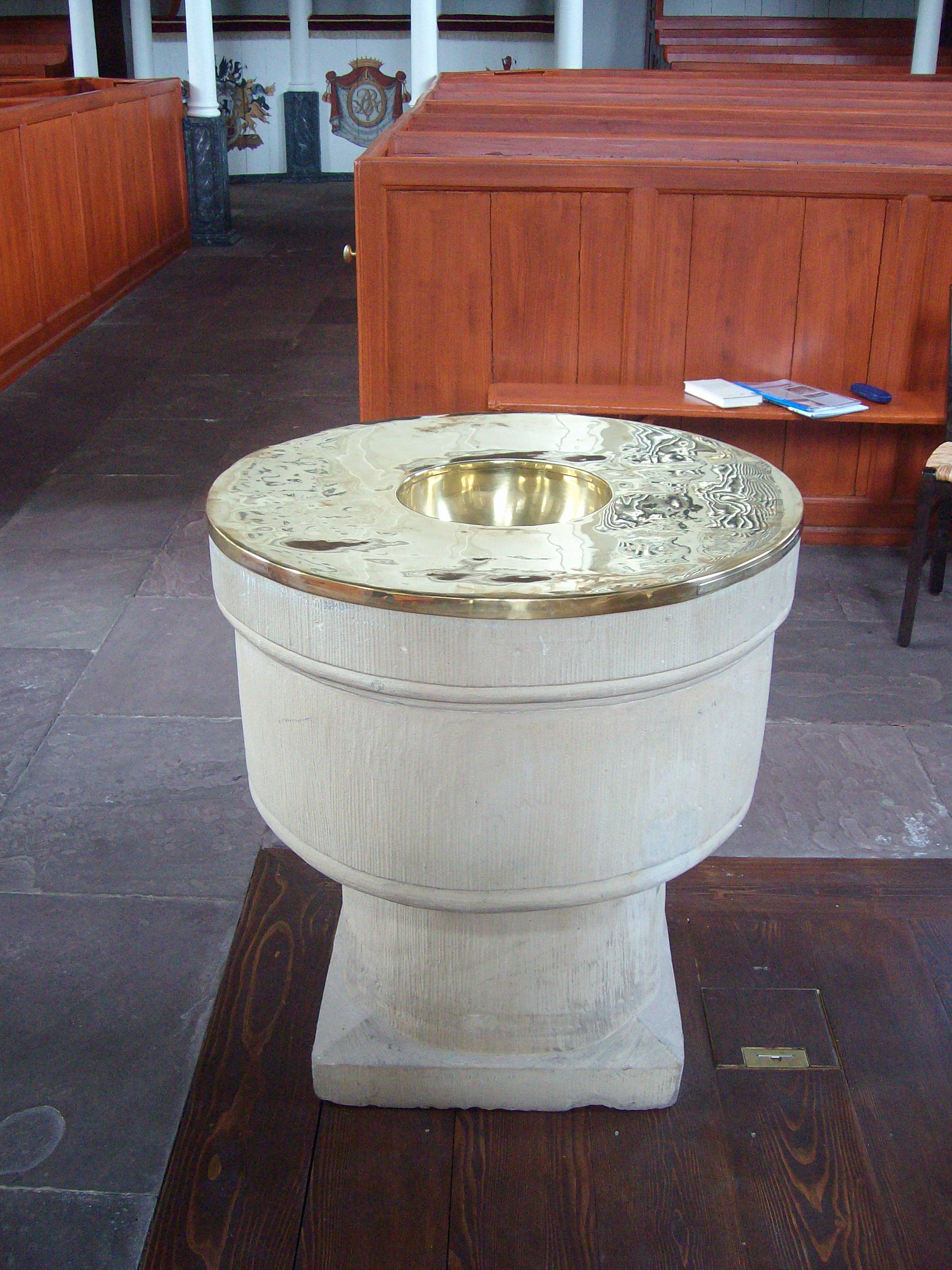 Taufstein der Großen Kirche in Leer, Ostfriesland